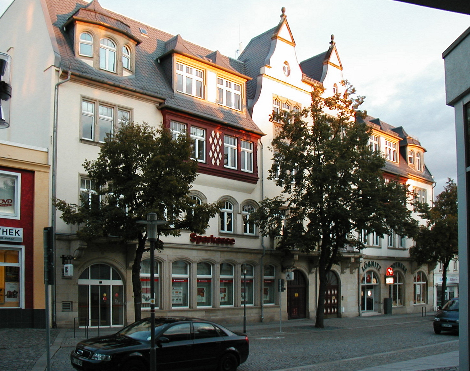 Gesamtansicht Hauptstr.25 in Radebeul